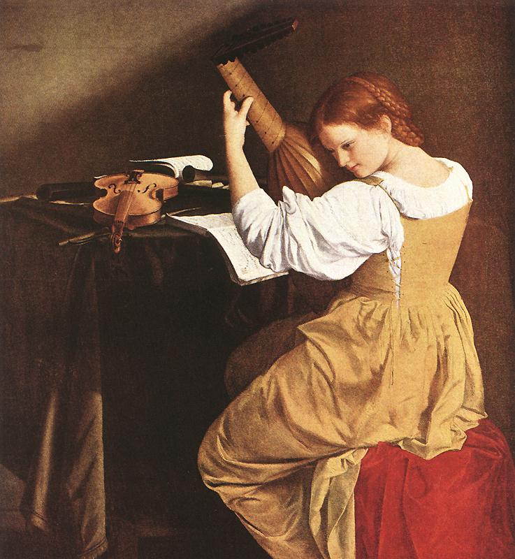 Lutspelerskan